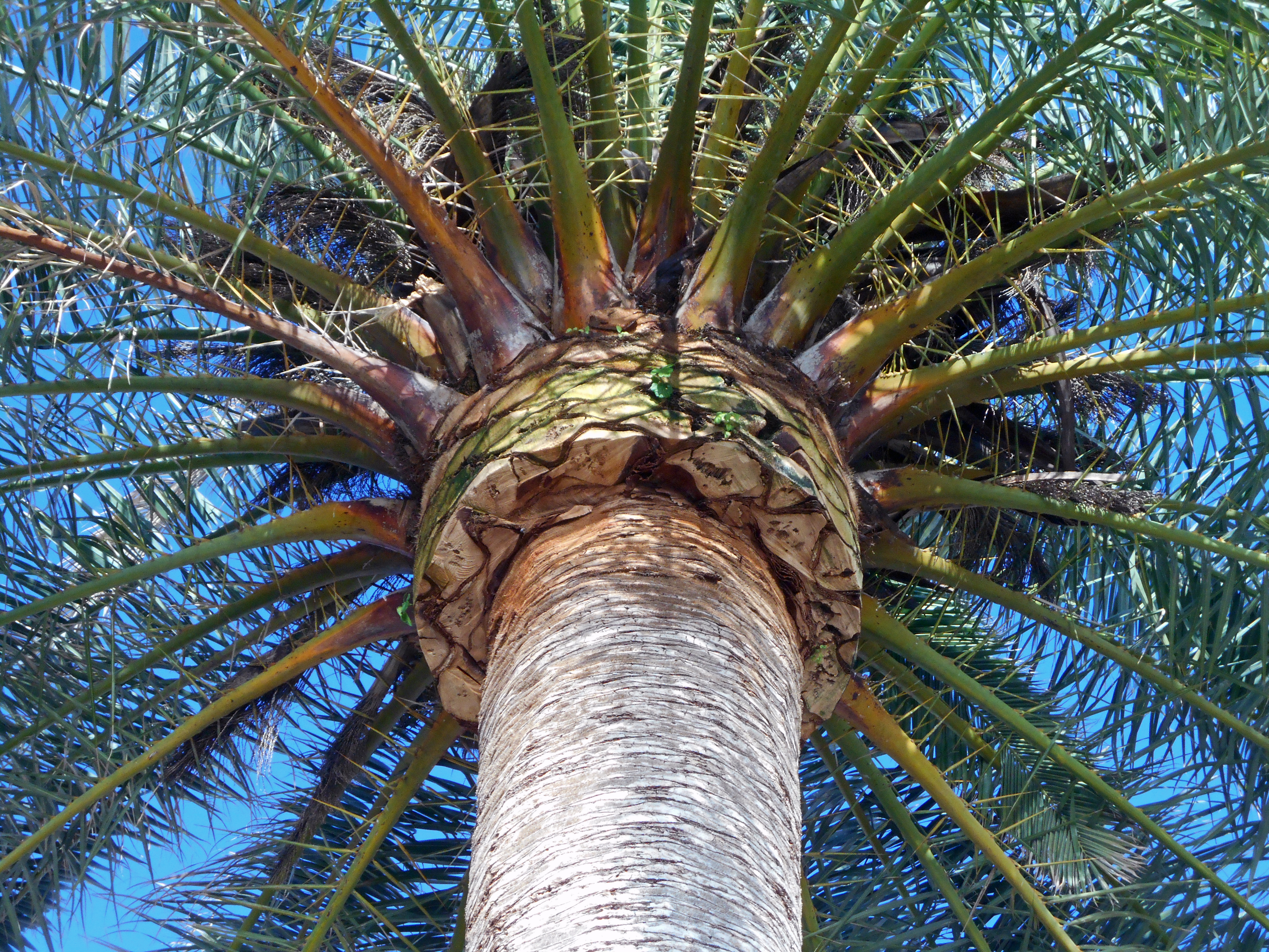 Struganje debla feniks palme (Phoenix canariensis) i uklanjanje mekih lisnih ostataka kao jedan od načina borbe protiv crvenog palminog surlaša (Rhynchophorus ferrugineus)